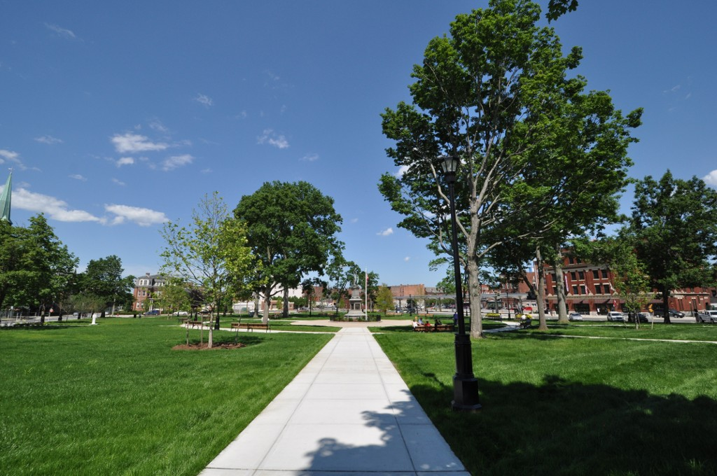 Hampden Park, Holyoke, Massachusetts